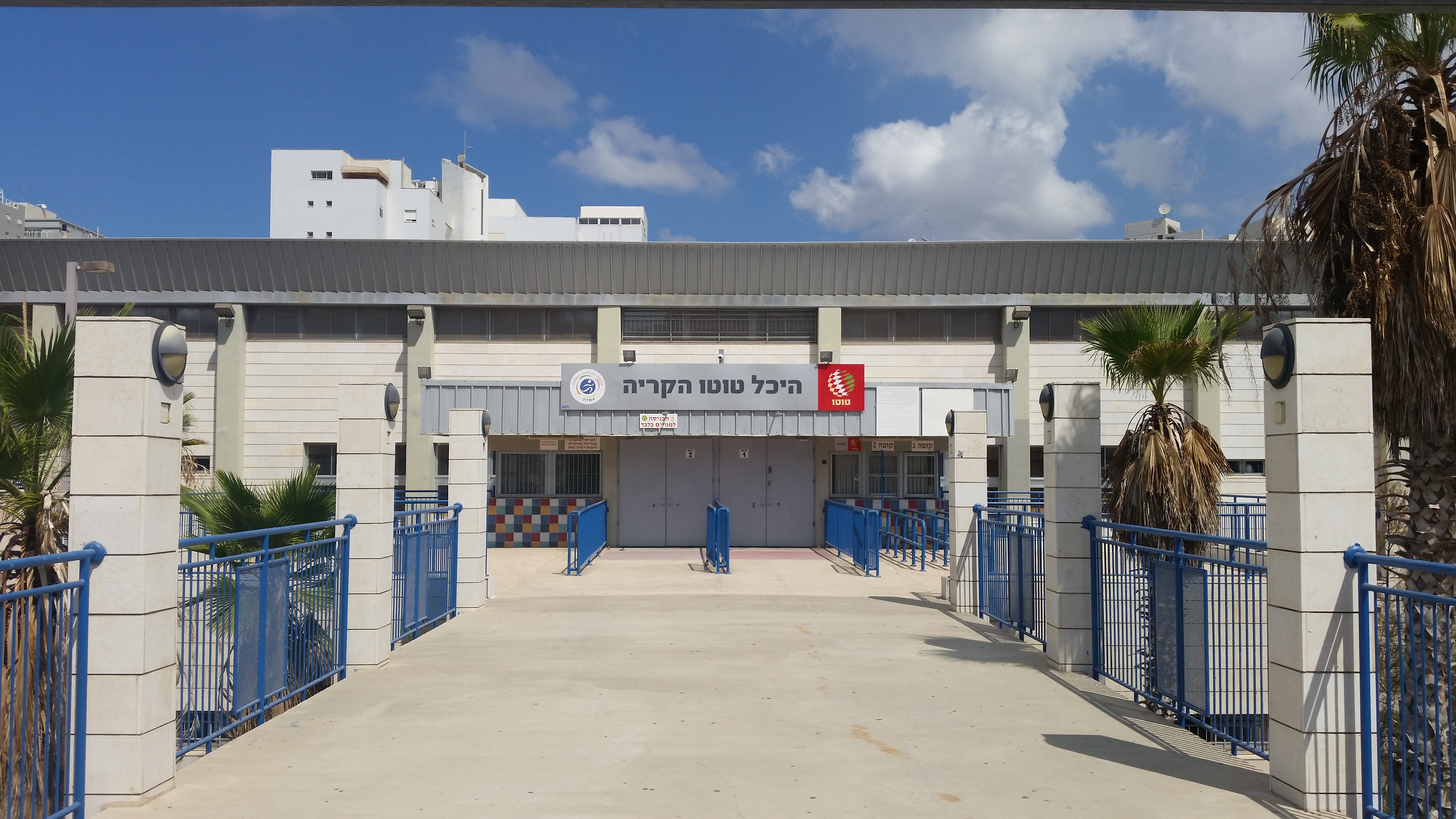 הכניסה הראשית לאולם